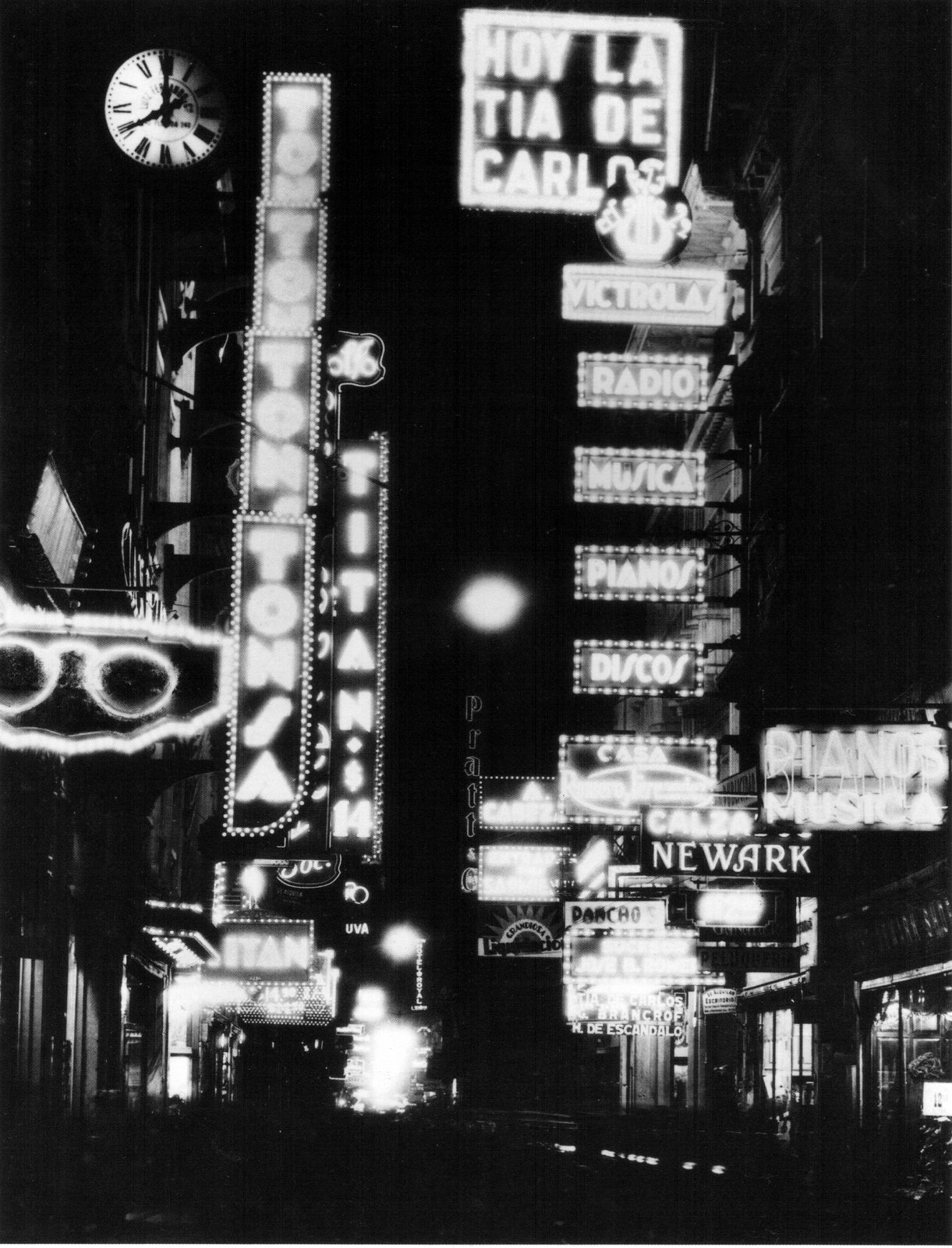 Marquesinas sobre la calle Florida, Buenos Aires, en 1936. Nota: Según el nombre original del archivo, la imagen es de Corrientes al 900, lo que resulta improbable porque las obras de ensanche ya habían sido realizadas en ese tramo para 1936. A la izquierda, anteojos y reloj de la casa Lutz Ferrando en Florida 240.